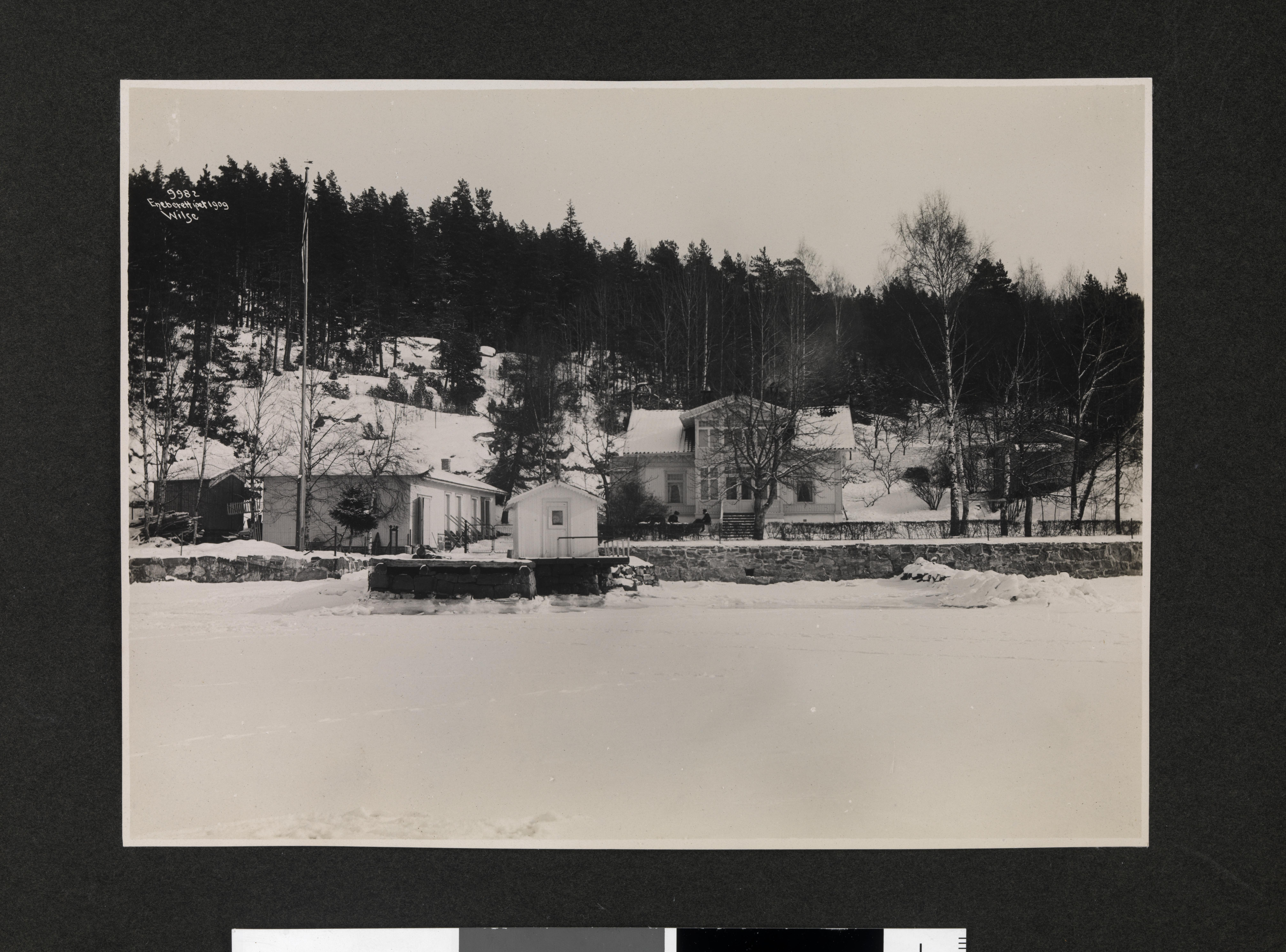 Bildet er hentet fra Nasjonalbibliotekets bildesamling. Anmerkninger til bildet var: Tittel fra Galleri NOR (Wilses protokoll) Bildet er del av albumet "Roald Amundsen" (846212) Svartskog, Oppegård, Akershus